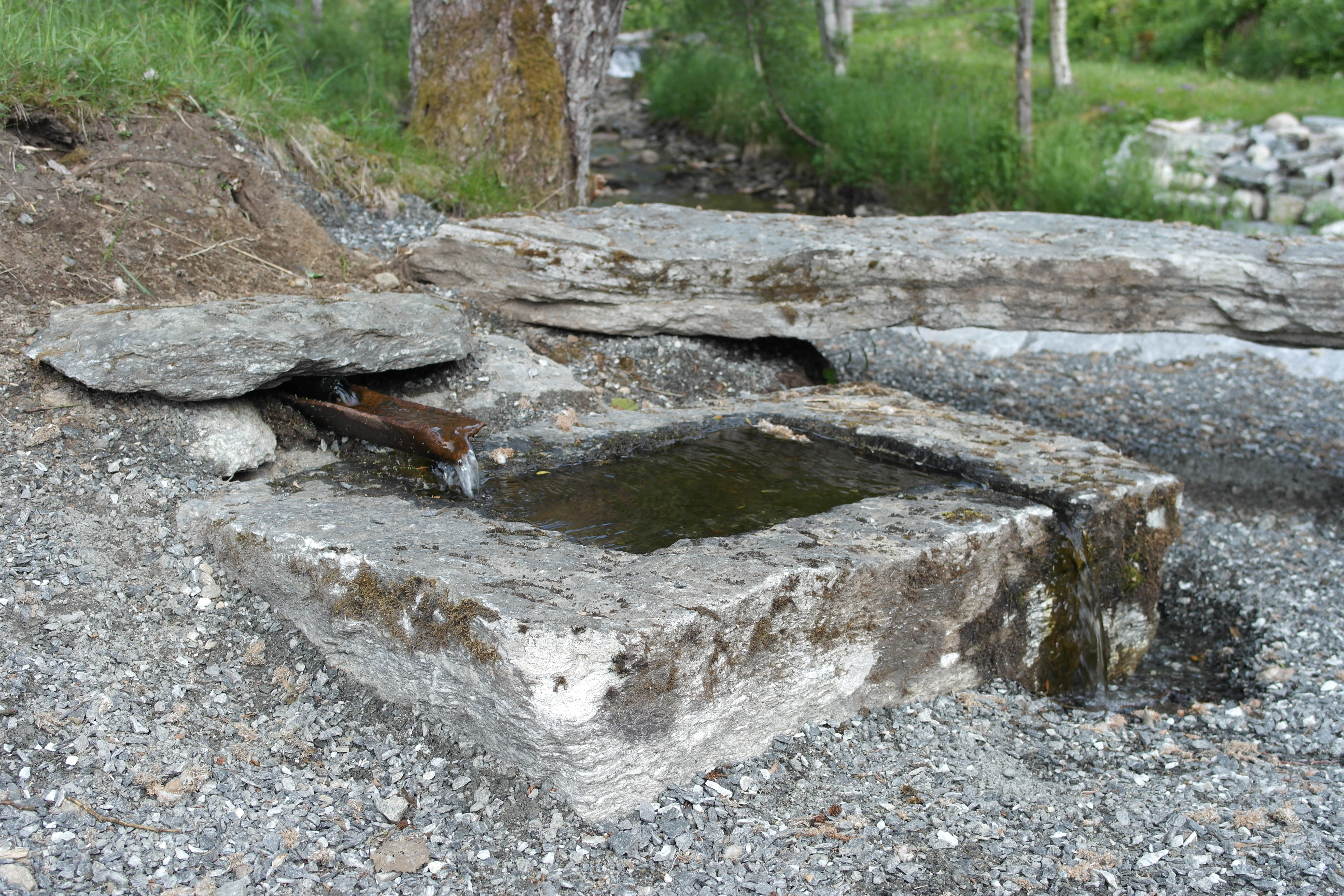 Hesten var i mange år det viktigaste framkomstmiddelet, og vatn var svært viktig for dei hardtarbeidande hestane langs vegane. Denne hestebrønnen sto opphavleg på vegen mellom Sandane og Reed, og vart flytt til Nordfjord Folkemuseum i 1973.